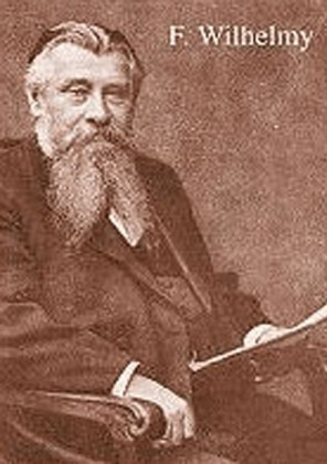 Portrait de Ludwig Ferdinand Wilhelmy